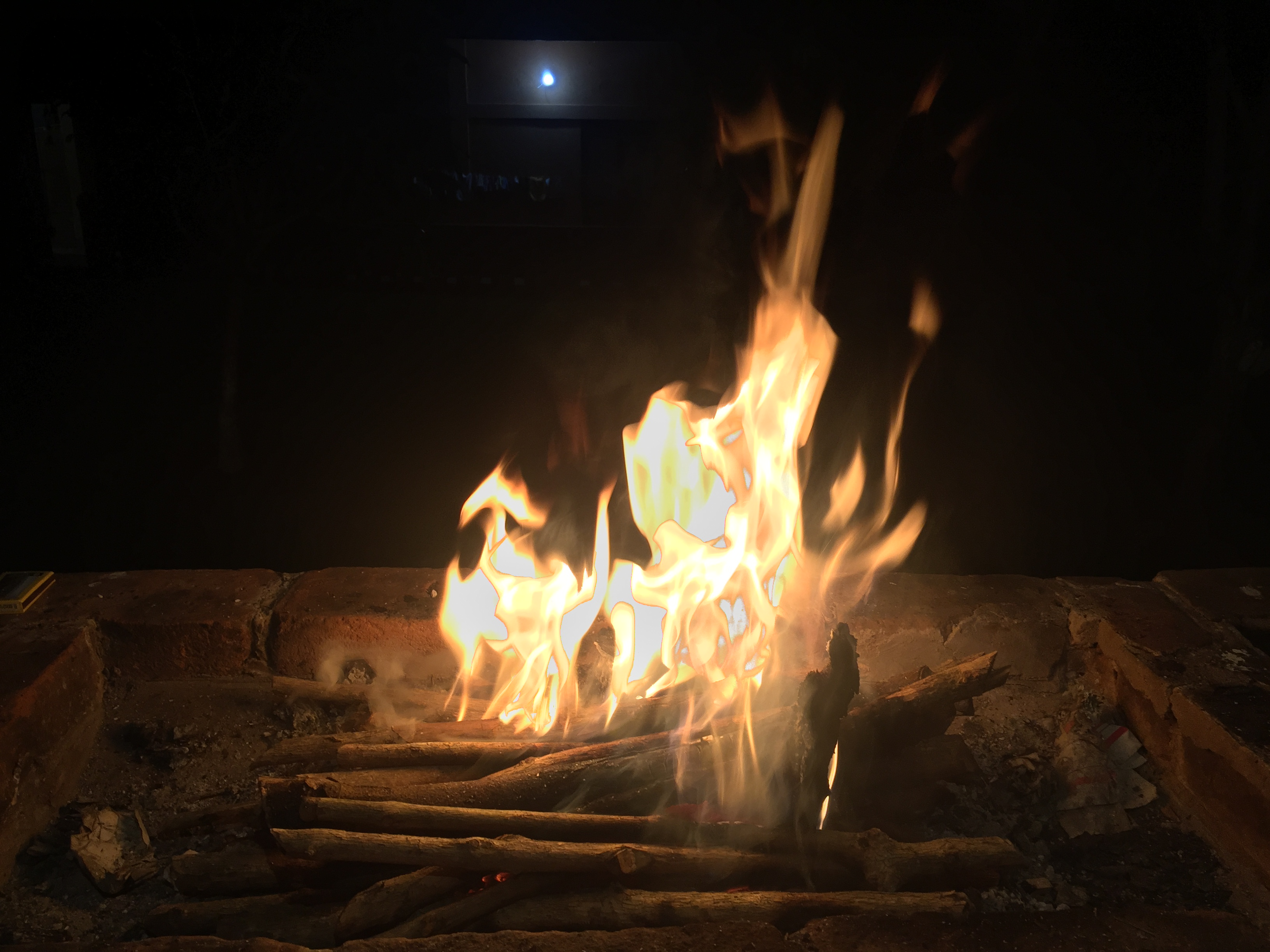 Leña en Fuego